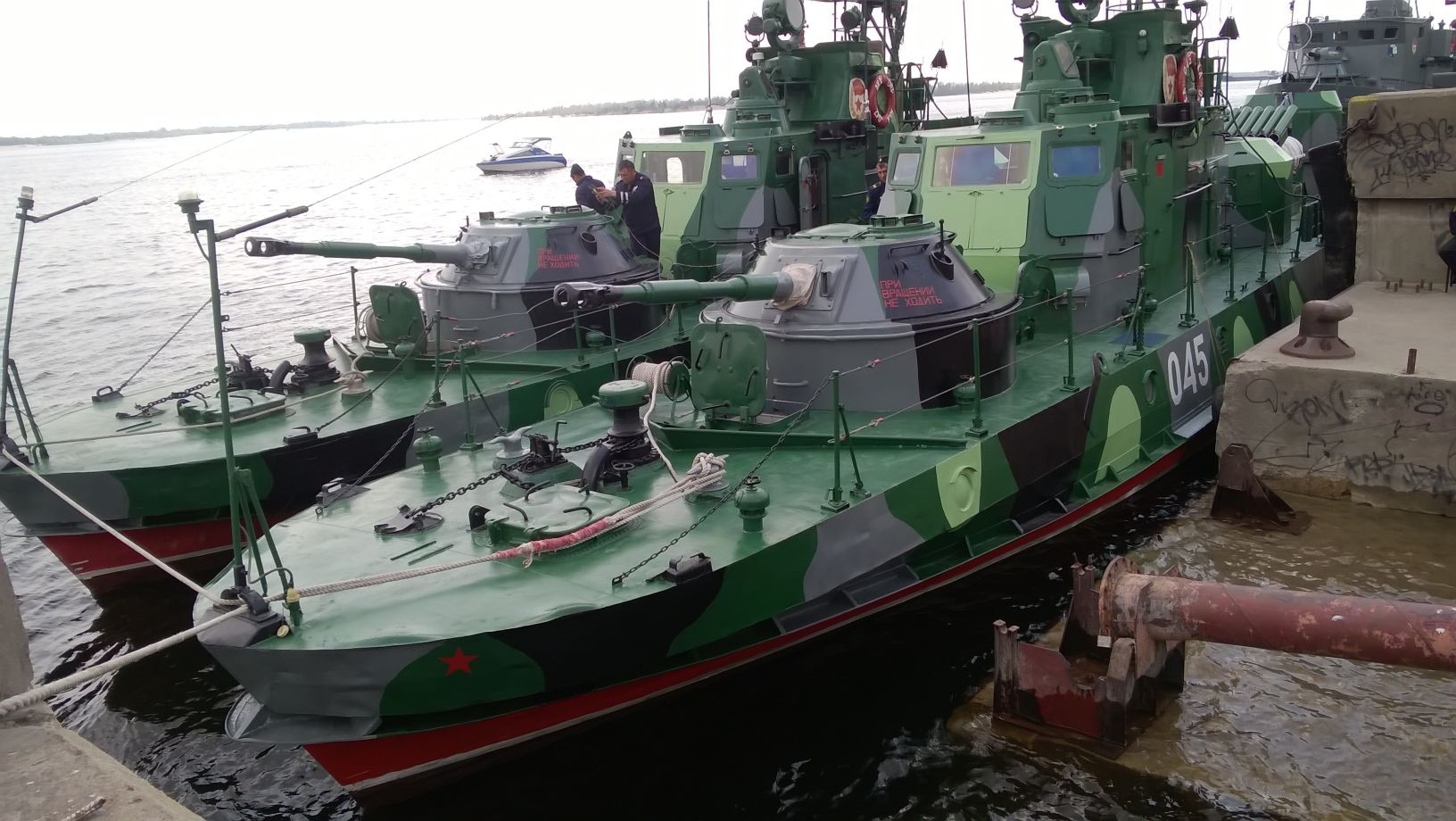 Артиллерийские катера проекта 1204 на набережной Волгограда